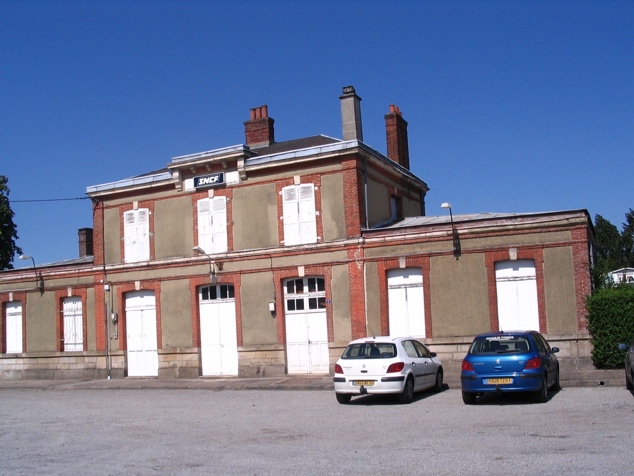 Gare de Sainte-Gauburge-Sainte-Colombe Orne, France